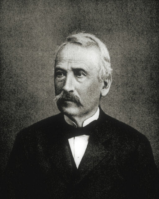 Julian Dunajewski